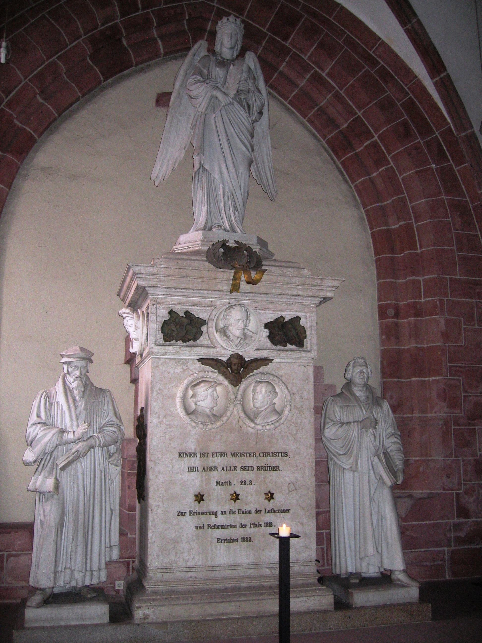 Das Unionsdenkmal (erbaut aus Mamor im Jahr 1883 von Konrad Knoll) in der Stiftskirche Kaiserslautern zur Erinnerung an die Union der Lutheraner und Reformierten der Pfalz im Jahr 1818. Links: Johannes Calvin, rechts: Martin Luther. Auf dem Sockel Portraits von Philipp Melanchton, Ulrich Zwingli, Martin Bucer, Ulrich von Hutten und Franz von Sickingen